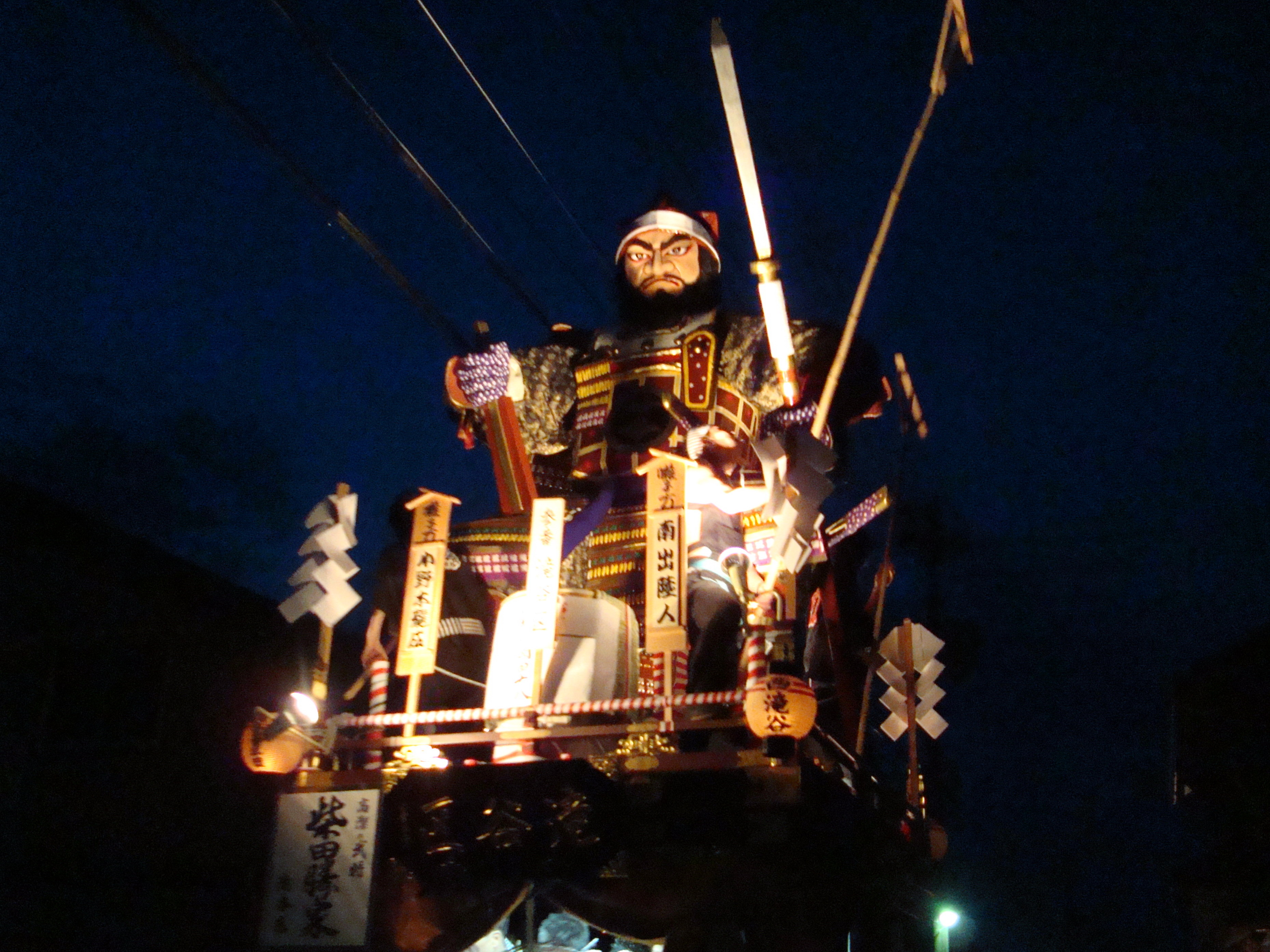 三国祭りの山車（柴田勝家）2011